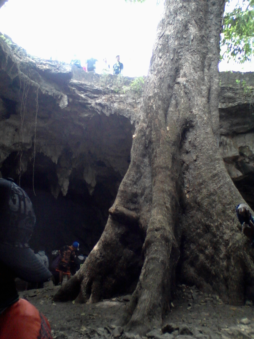 Pohon Gua Rancang Kencono